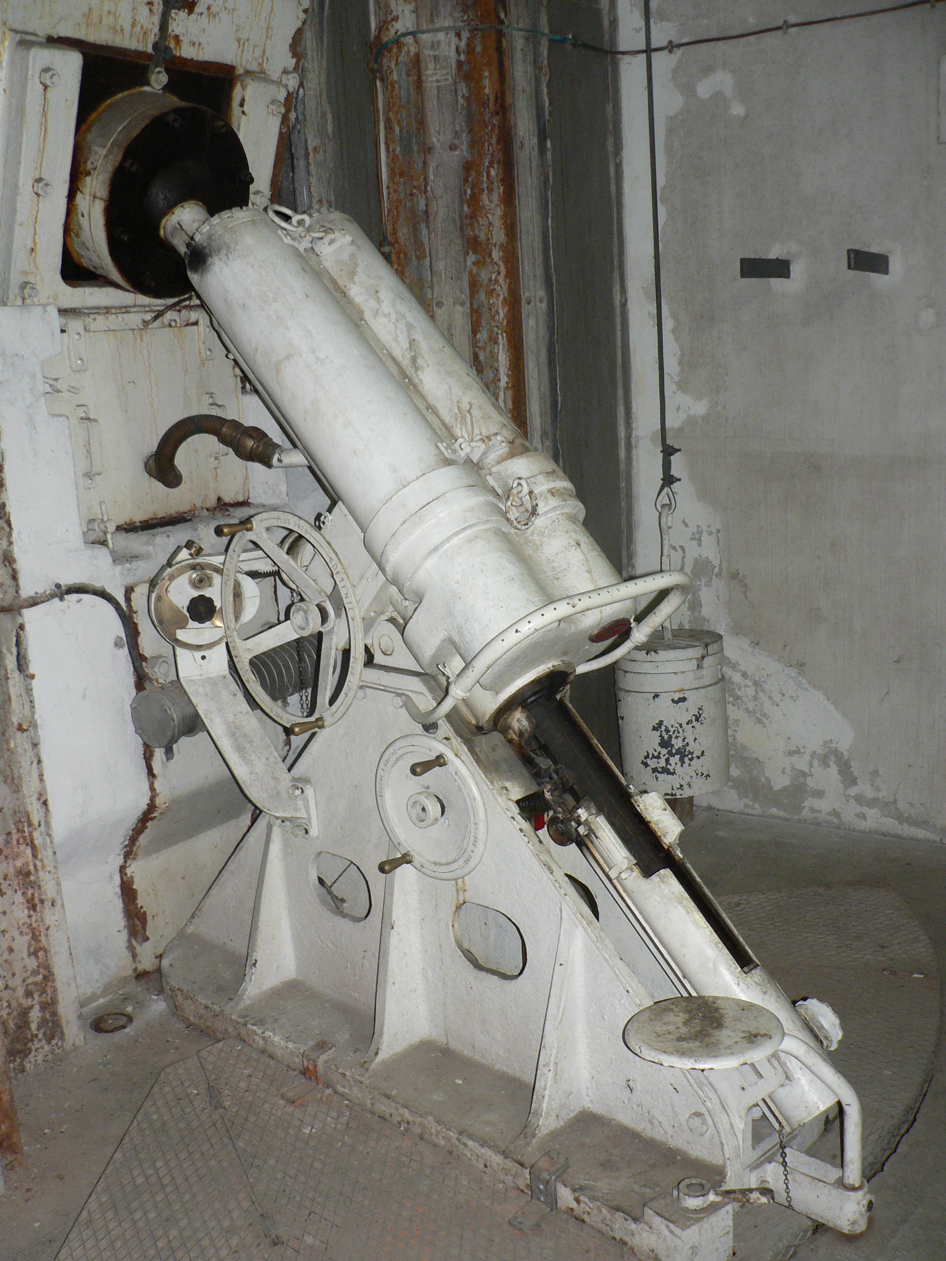 Fort Saint-Gobain, Modane 81 mm mortar